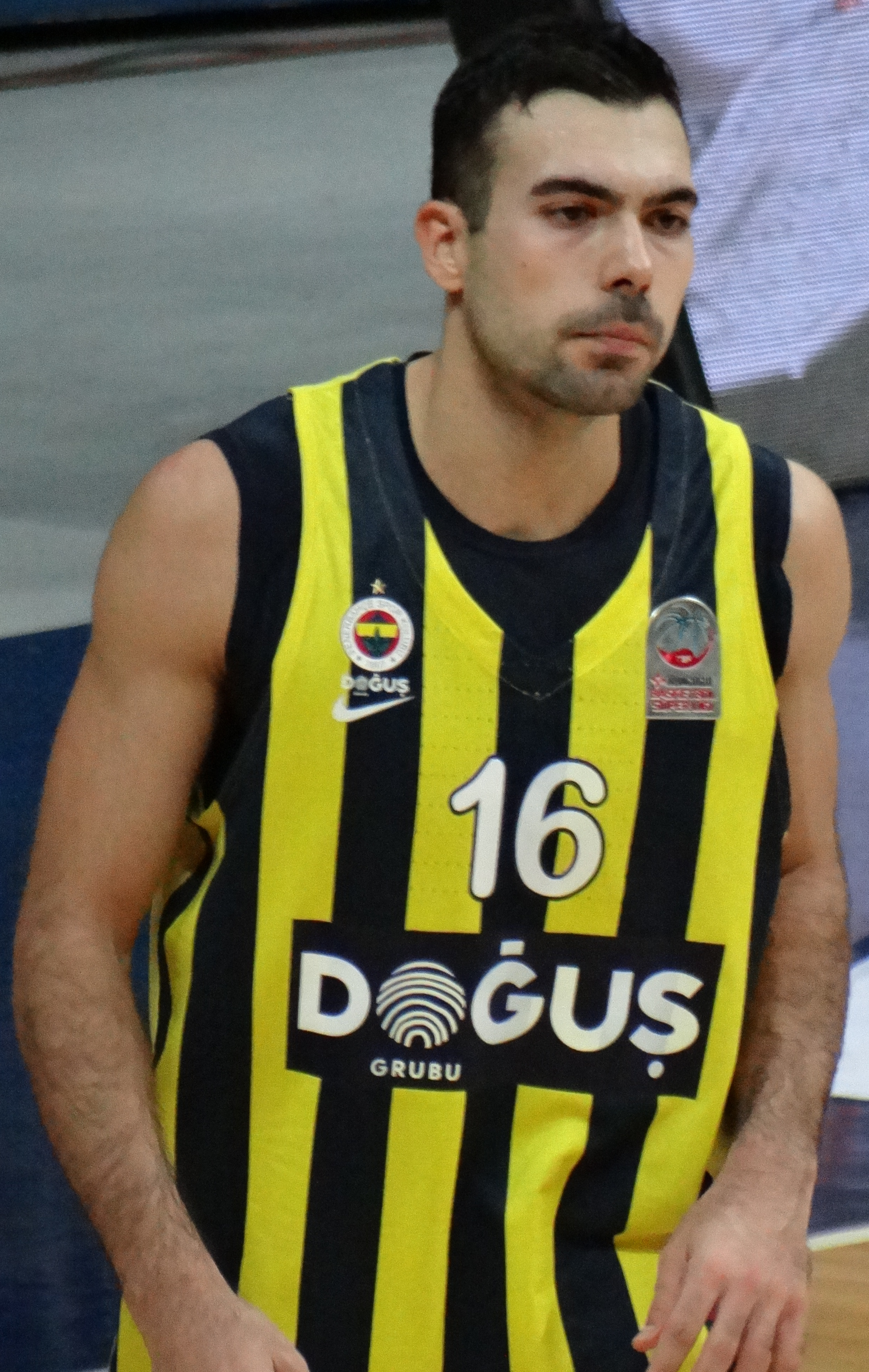 Kostas Sloukas 16 - FB Dogus 20171224